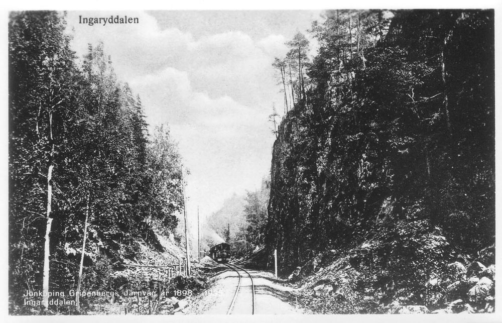 Ingaryddalen JGJ